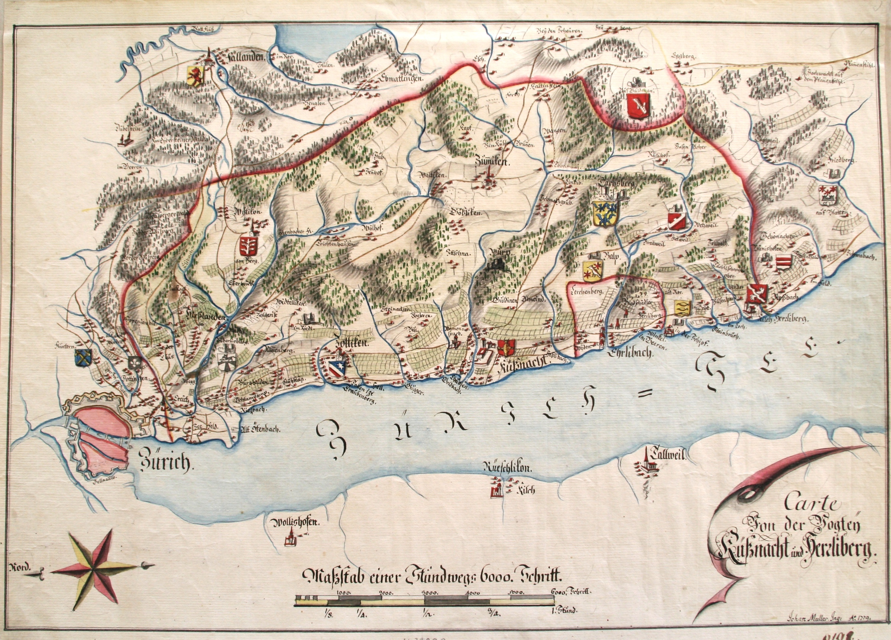 Vogtei Küsnacht 1779, gezeichnet von Johnnes Müller (* 14. Januar 1733 in Zürich, † 1816)